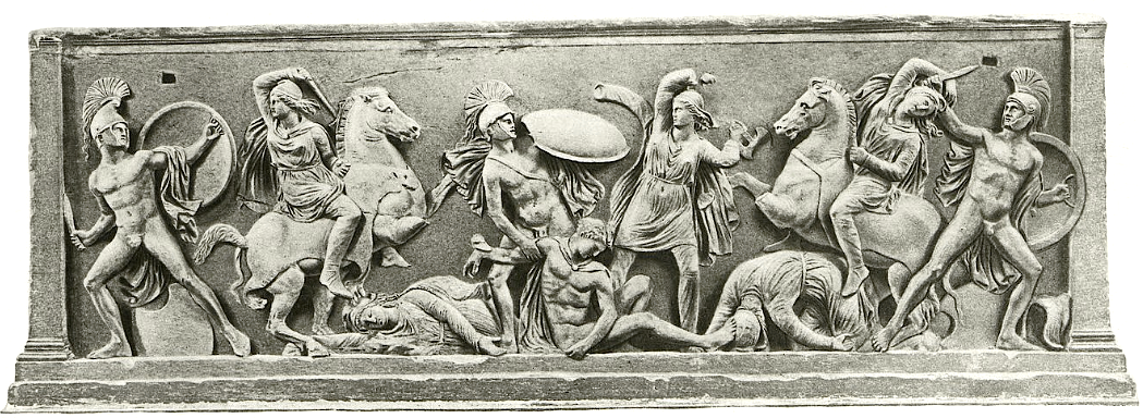 Amazonensarkophag im Kunsthistorischen Museum Wien aus Soloi (Zypern)